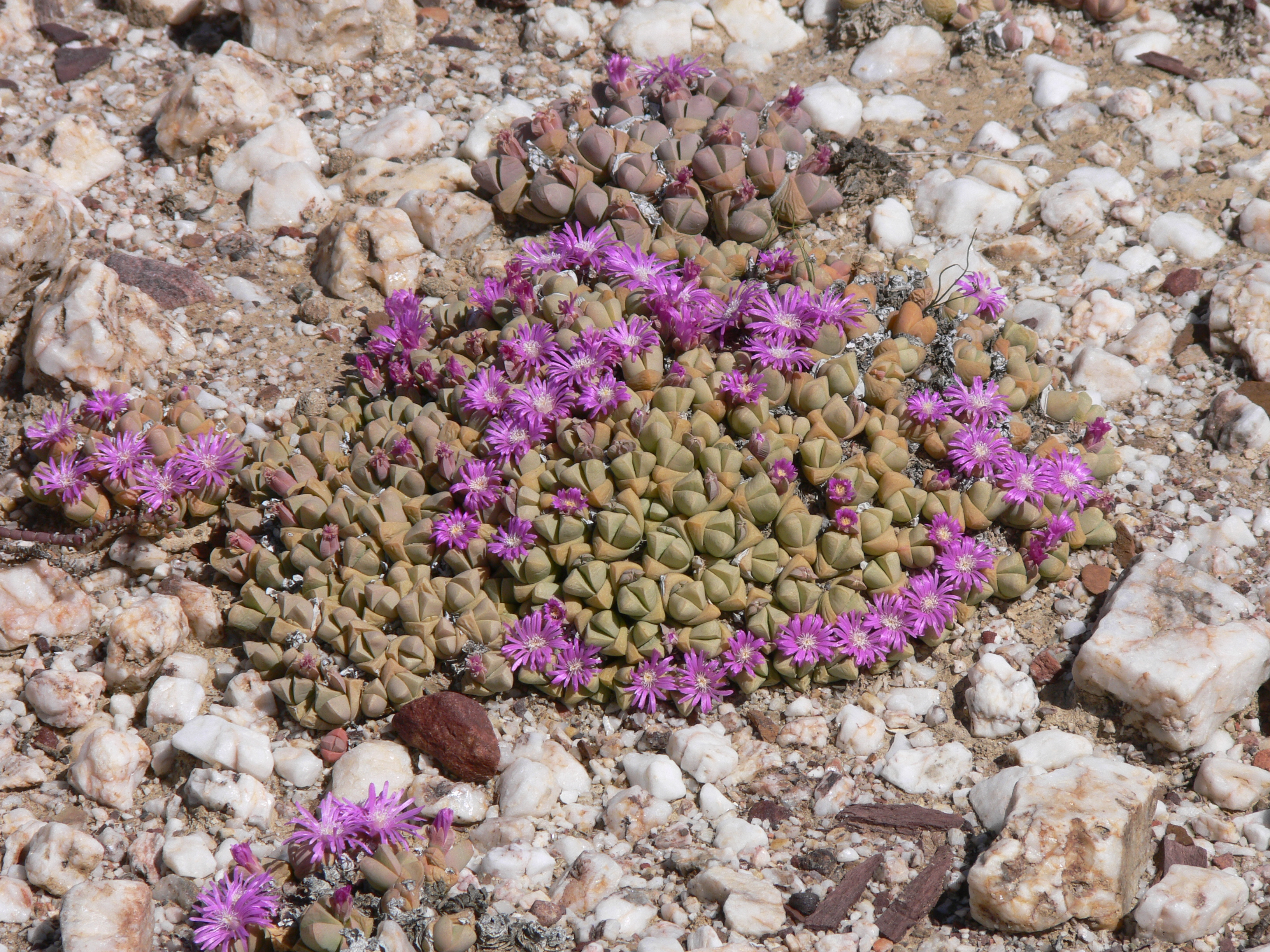 Antimima spec. (A. lawsonii?), Karoo, Westkap, Südafrika